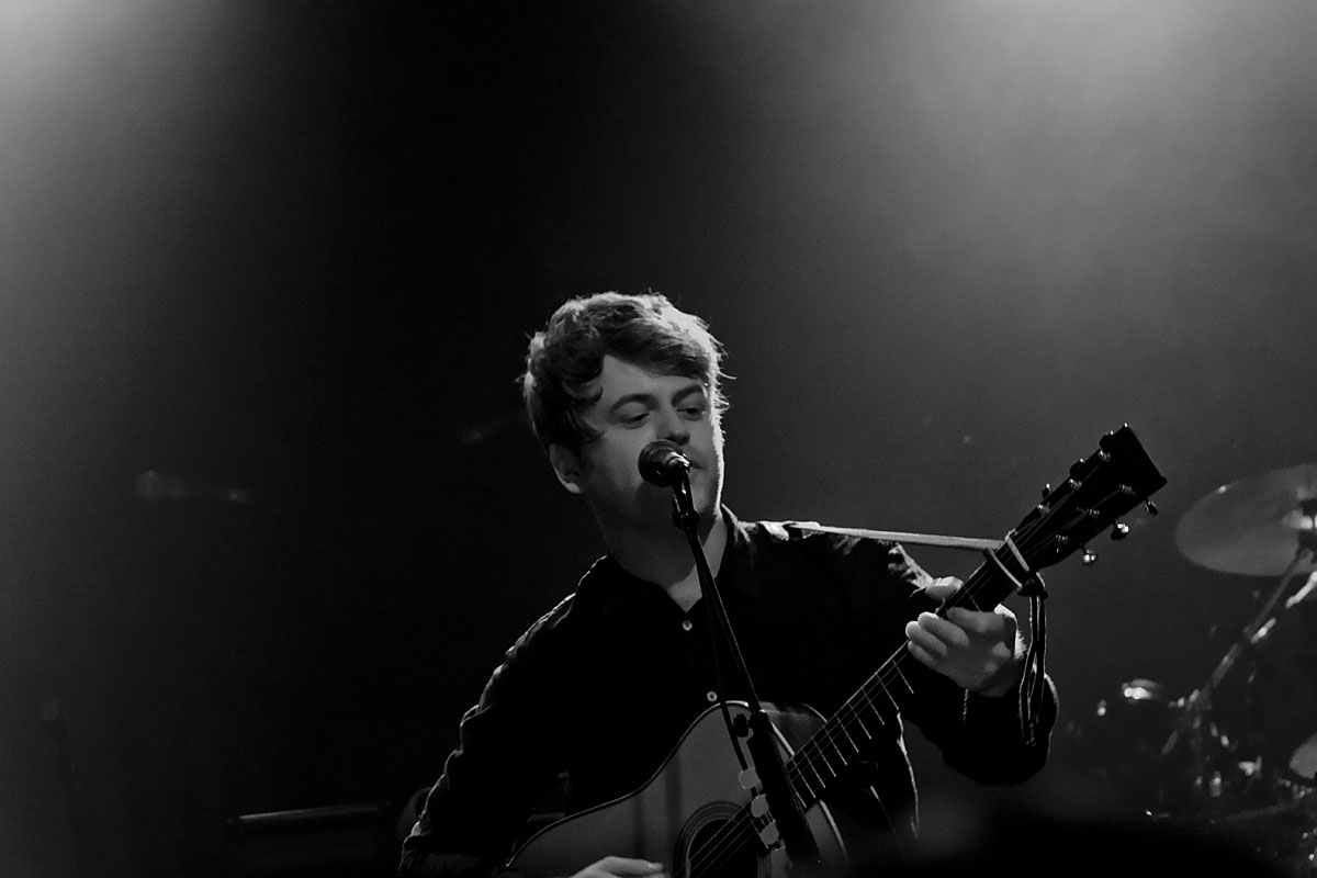 Christian Hjelm ved en koncert på Forbrændingen 17. februar 2013.